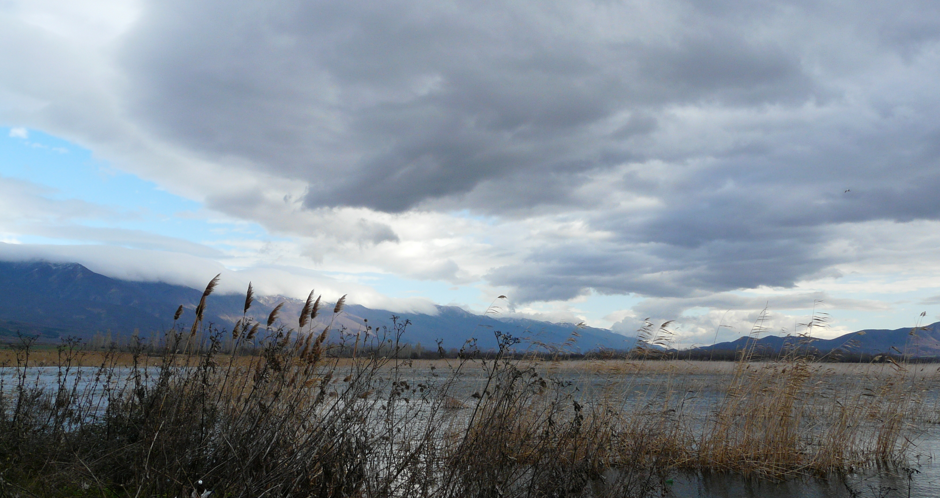 Dojran Lake, Macedonia